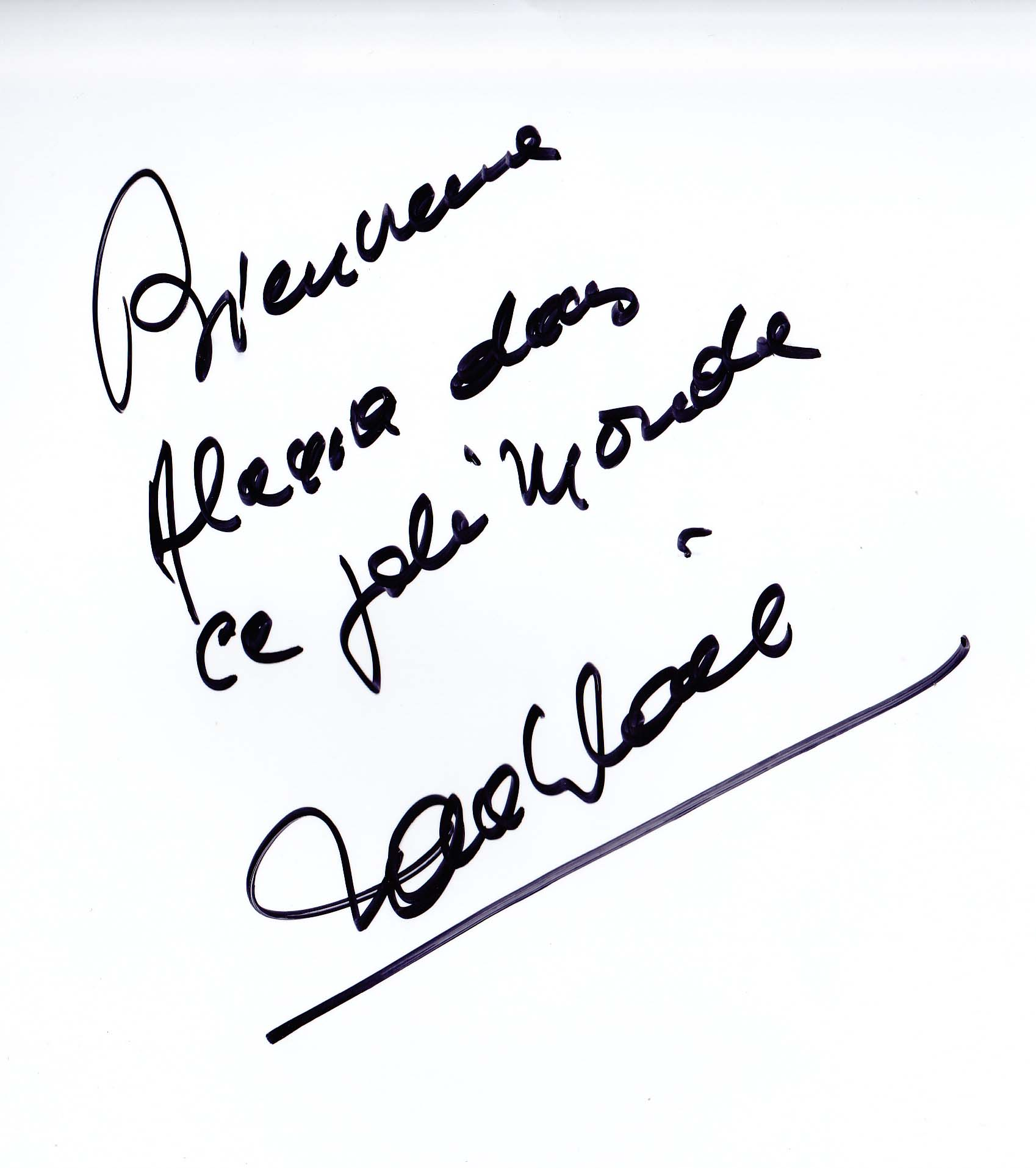 Signature de Frank Michaël